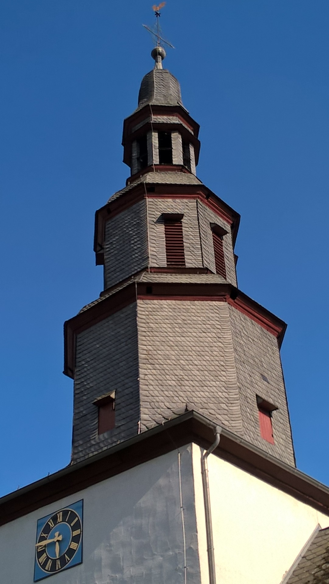 Evangelische Kirche Niederbiel, Solms, Lahn-Dill-Kreis, Hessen, Deutschland